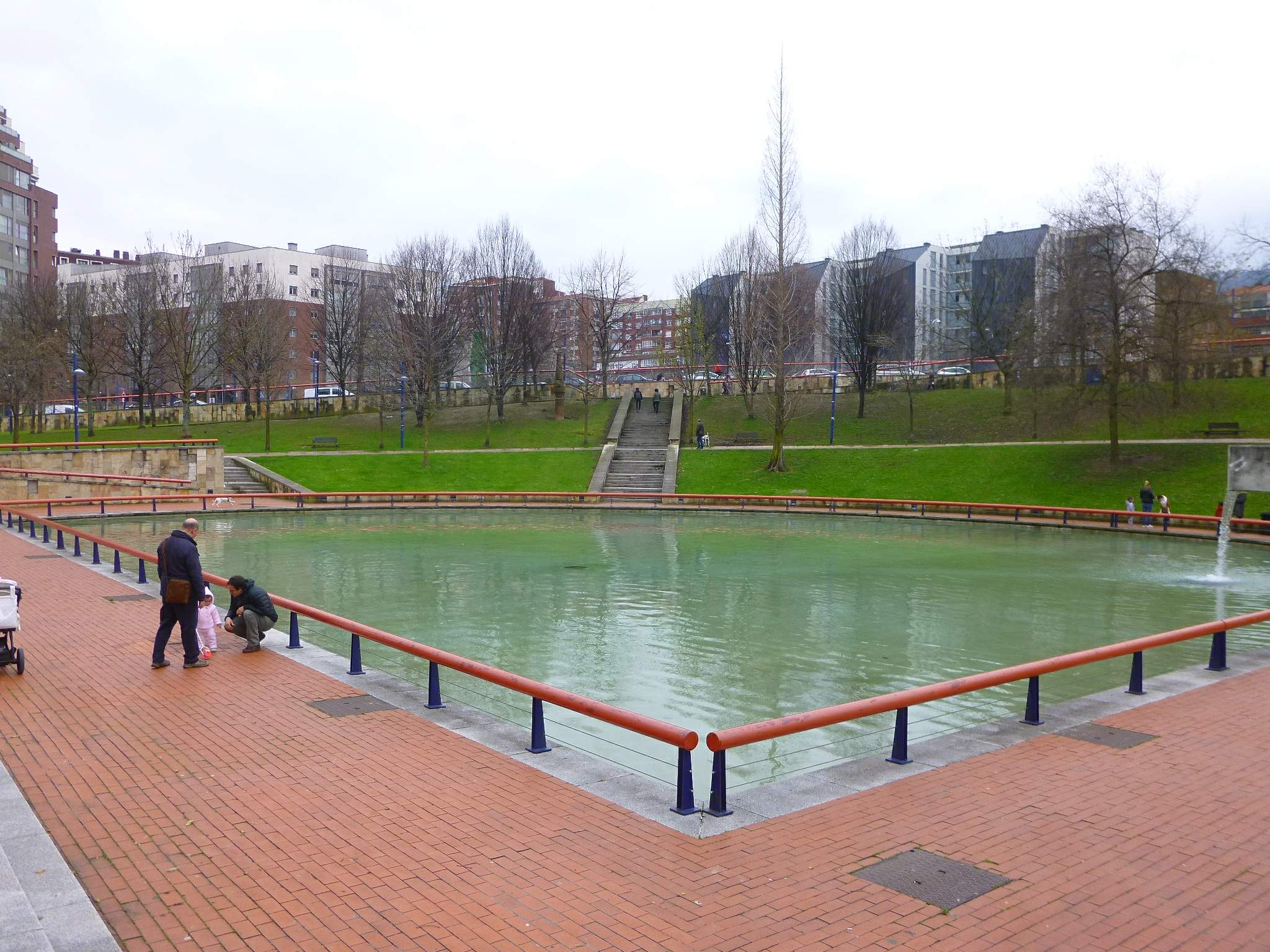 Parque de Ametzola (Bilbao)